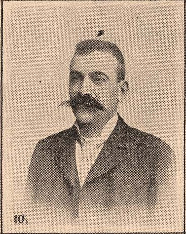 Dobozy István főszolgabíró